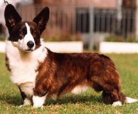 Welsh Corgi Cardigan "Kolla"